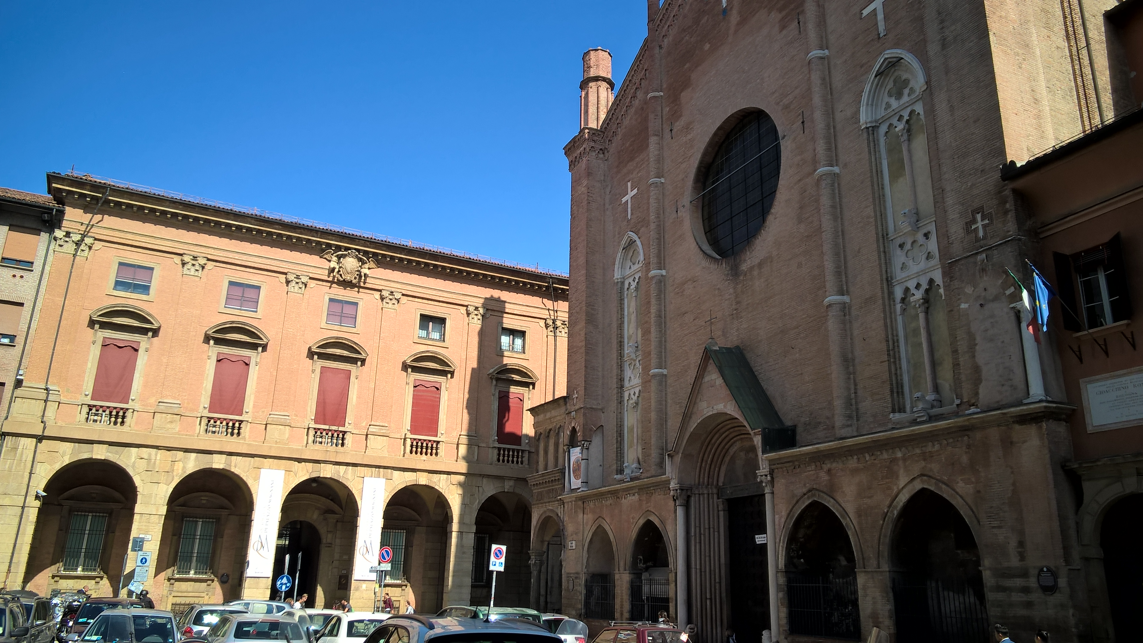 Fachada do Palazzo Magnani, em Bolonha, vendo-se do lado direito, a fachada poente da Igreja de São Tiago Maior.